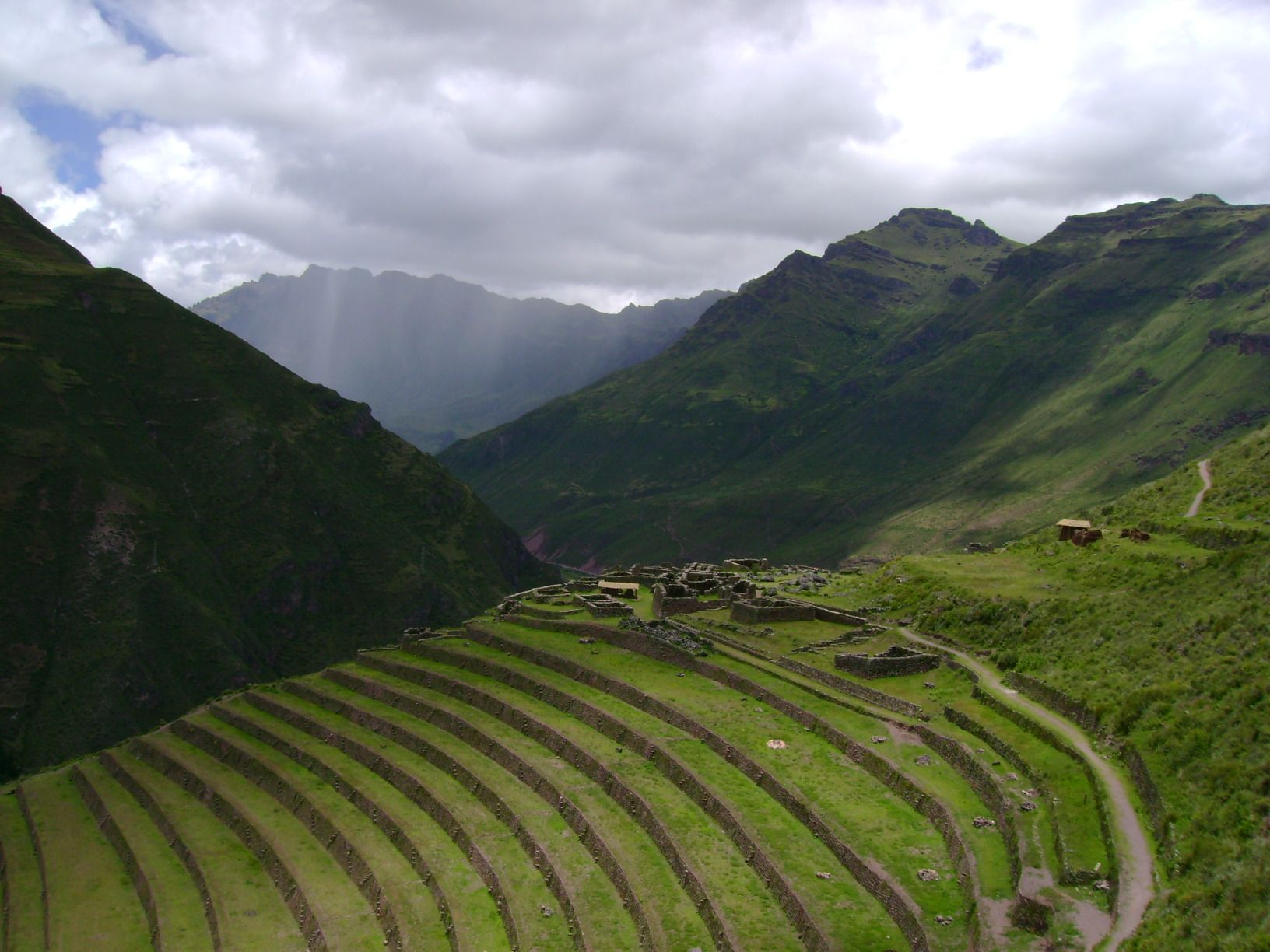 Foto tirada por mim, em Pisac.